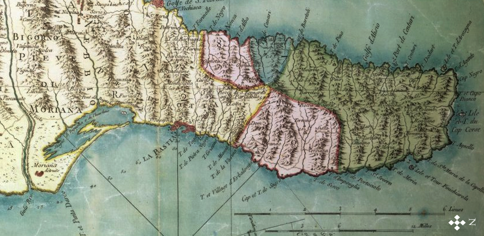 Le Cap Corse - Extrait de la carte militaire de Corse en 1768 - Sont marquées toutes les paroisses et tous les principaux hameaux de chaque pieve / rectifiée en l'année 1740, suivant les ordres de Monsieur le marquis de Maillebois